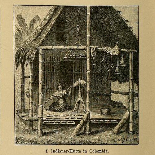 f. Indianer-Hutte in Colombia.